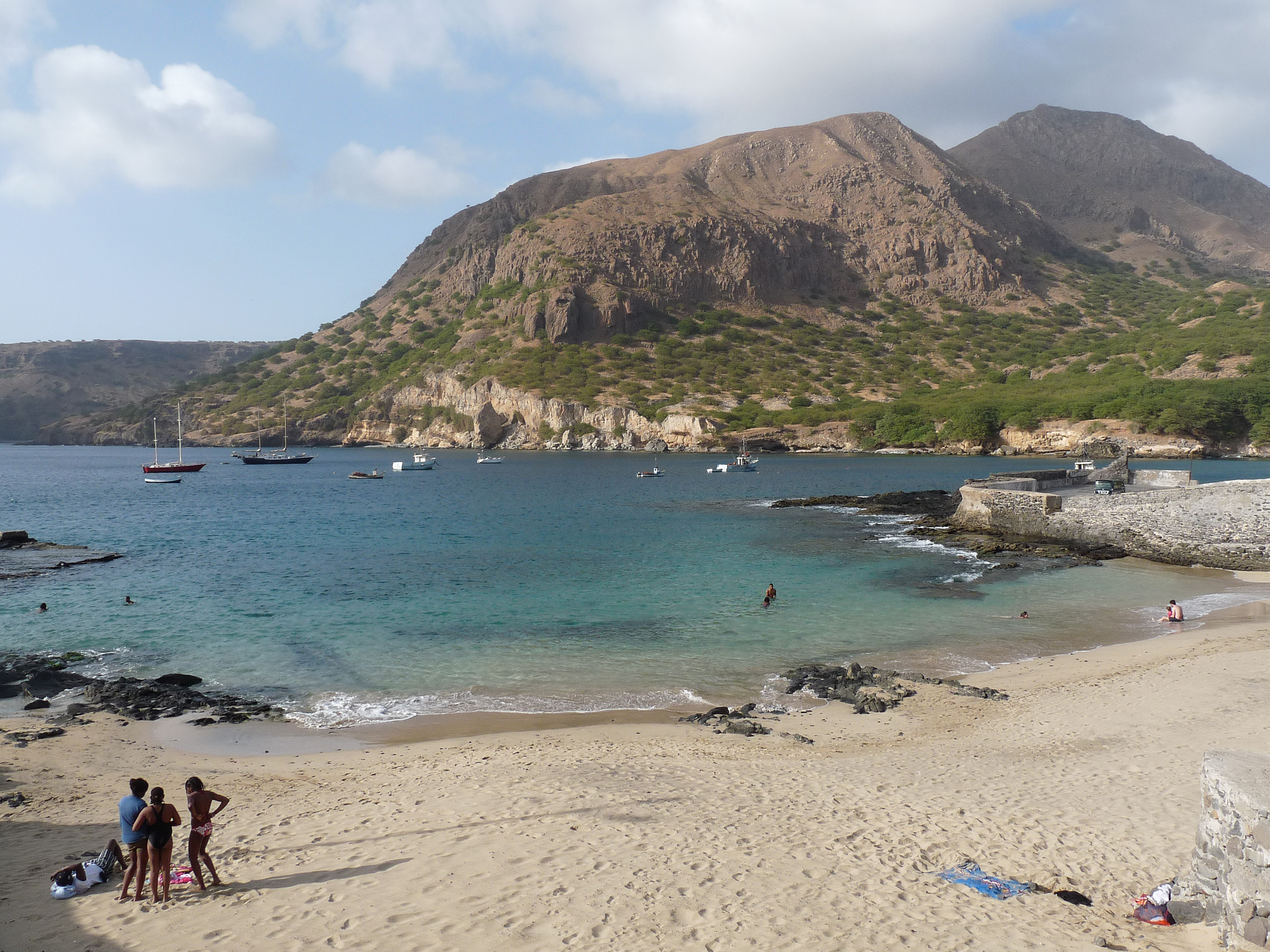 Plage de sable de Tarrafal (île de Santiago, Cap-Vert)